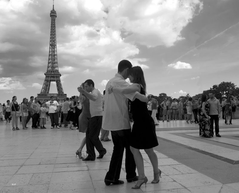 Un tirage argentique de 1989 issu de la série REVOIR PARIS, le parvis du Trocadéro à Paris face à la Tour Eiffel, une école de tango a investi les lieux – récompensé au concours de photographie de Moscou en 2006